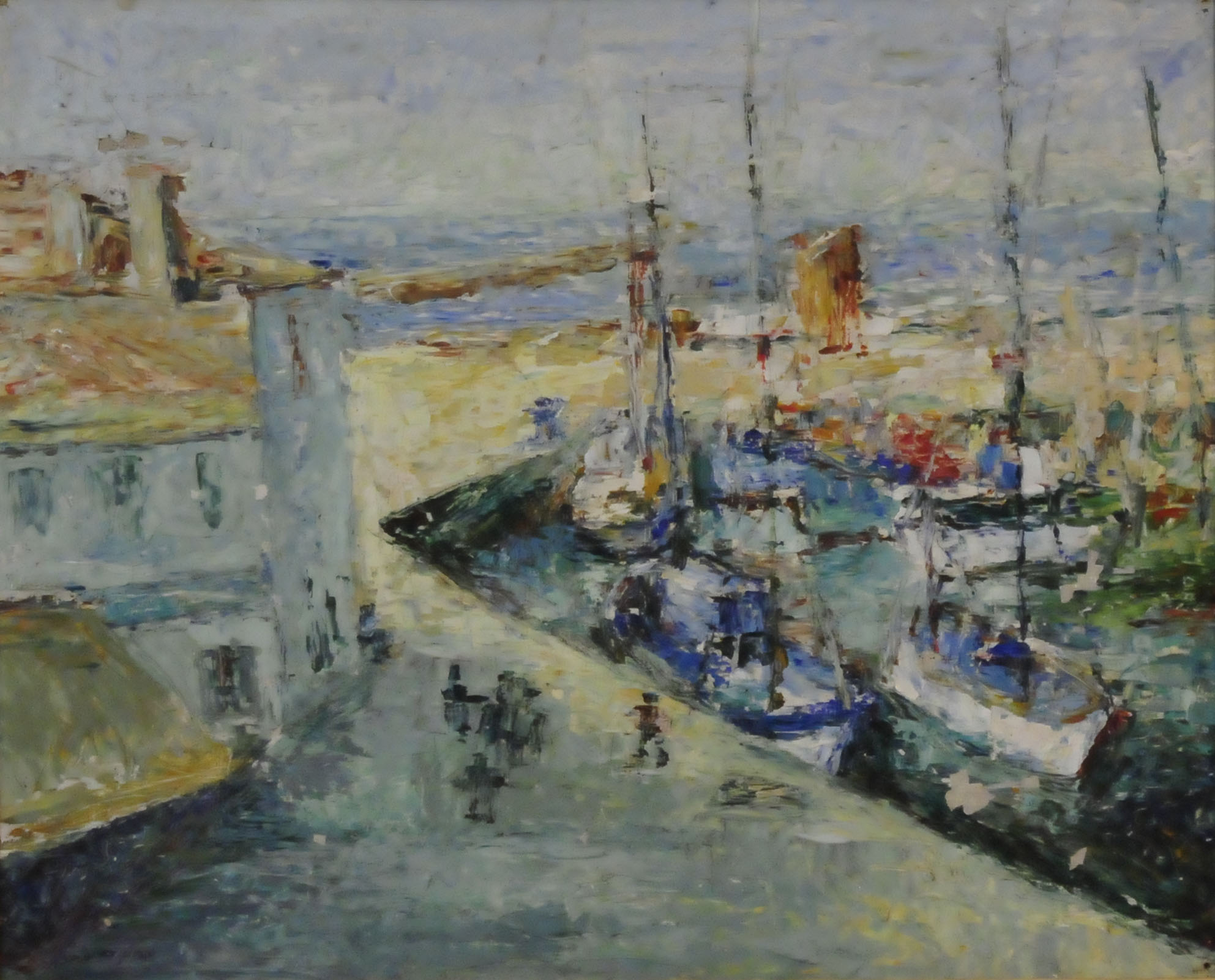 Peinture à l'huile de Charlotte Roimarmier intitulée "Port normand"